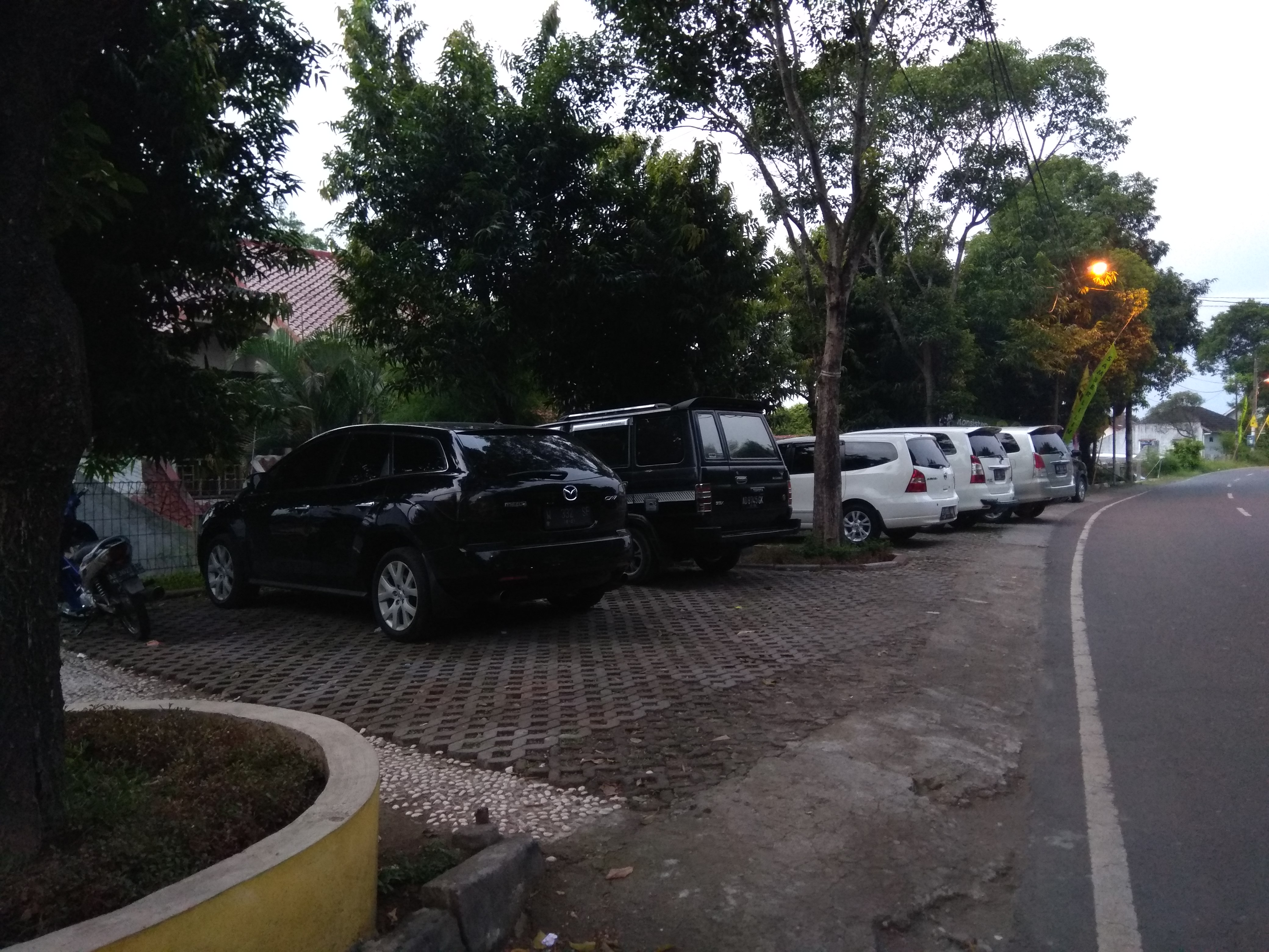 Tempat Parkir Taman Karang